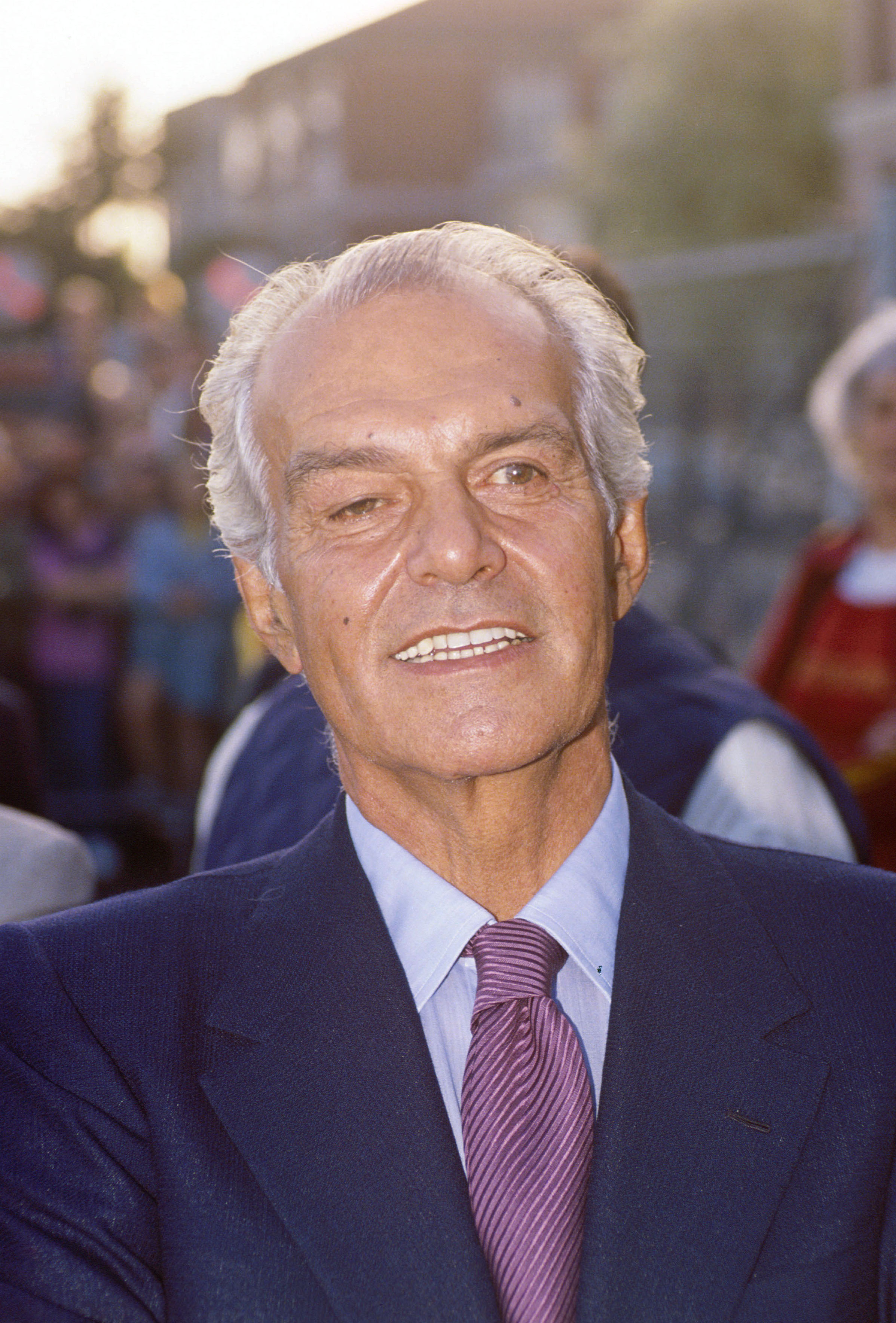 nel 1990